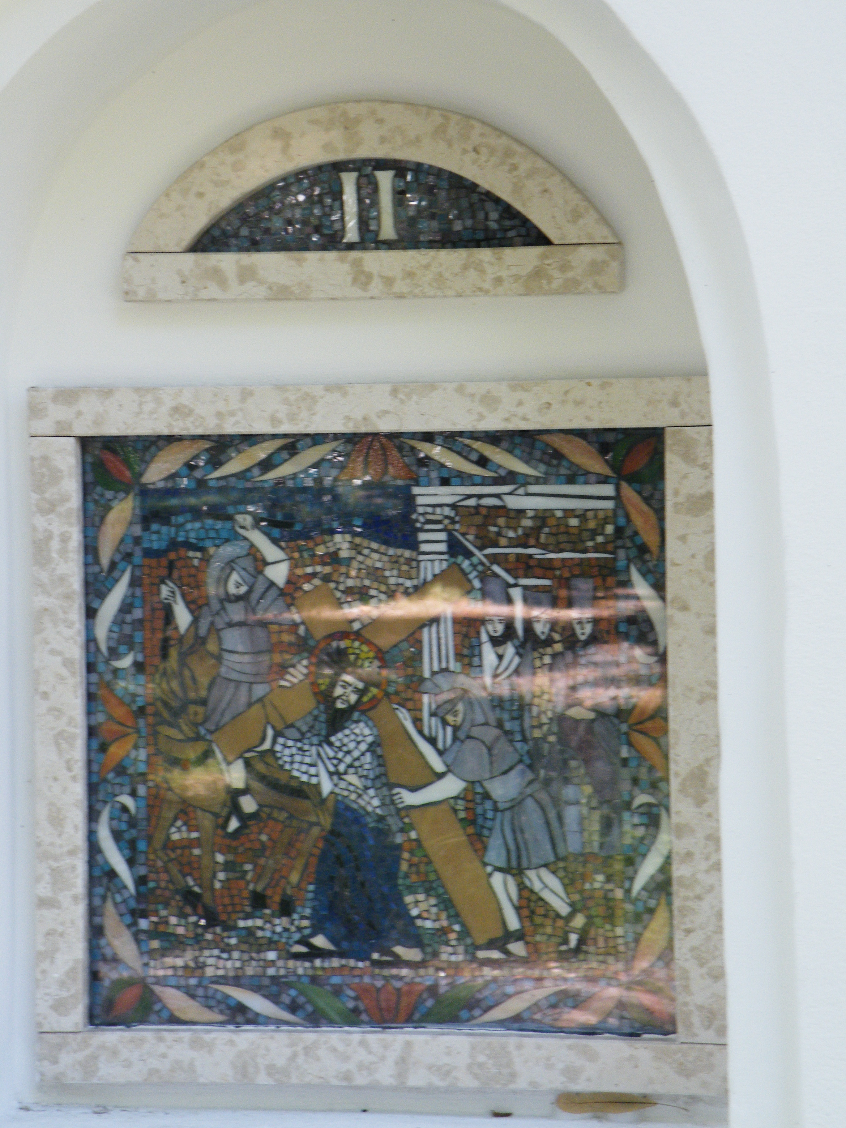 Stációk a Palóc ligetben, Balassagyarmaton